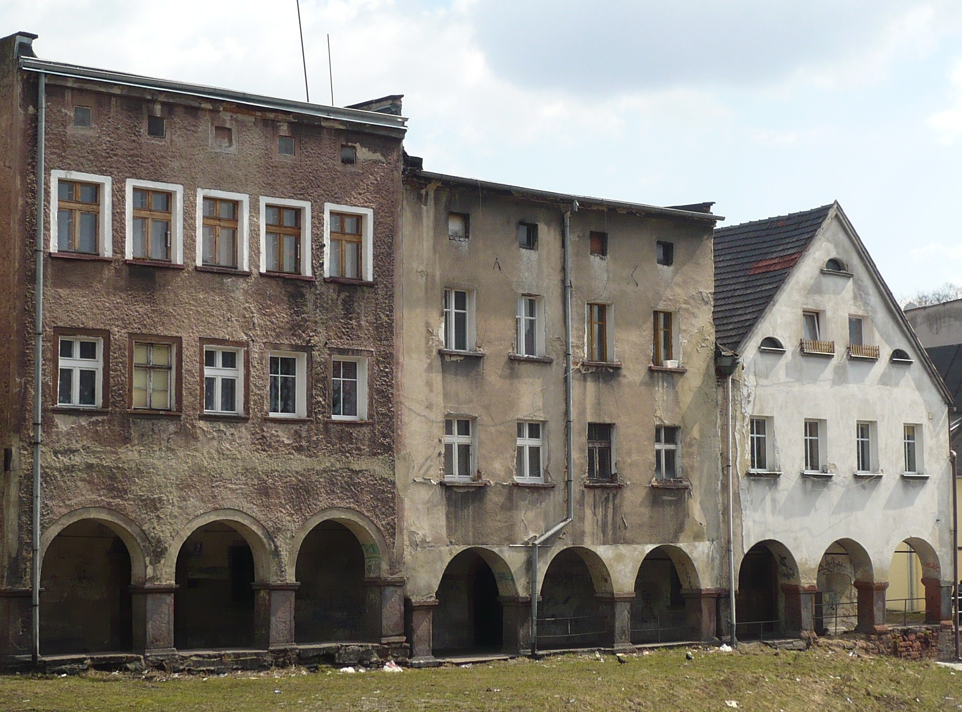 Nowa Ruda, ul. Nadrzeczna od lewej nr 7, 6, 5